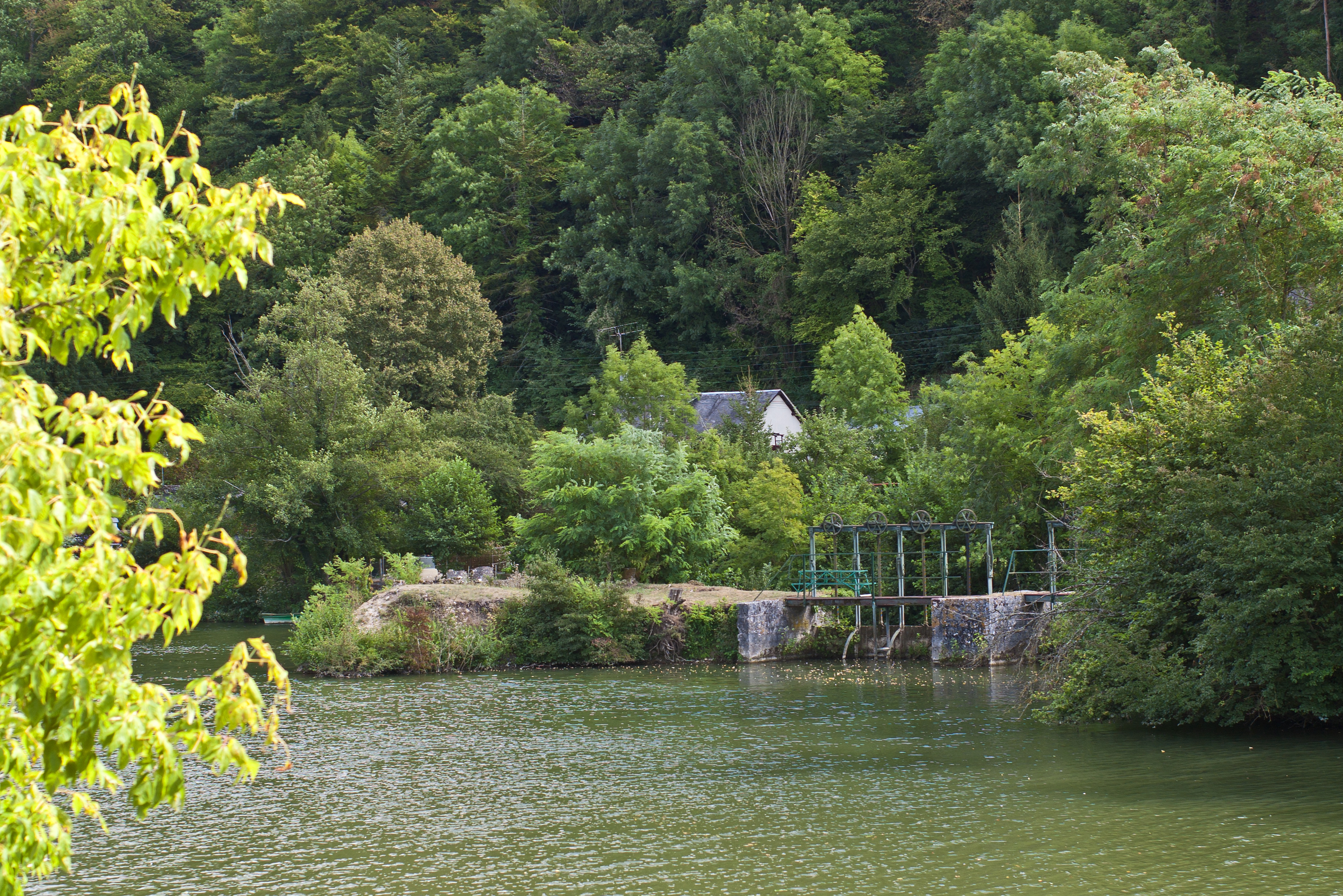 Écluse sur le Loir à Fréteval, Loir-et-Cher, France.